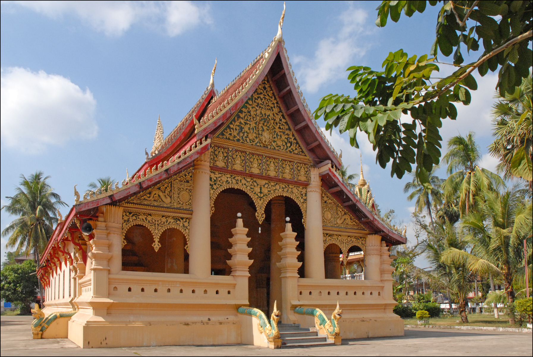 Le Vat Ong Theu est appelé également Pagode du Bouddha lourd. Il a été initialement construit au 16ème siècle par le roi Setthathirat, celui qui a construit le Grand Stupa (That Luang). La pagode a été détruite lors de l'invasion siamoise de 1828 puis reconstruite au 19ème siècle. Ce monastère est la résidence du Patriarche Suprême du Laos.